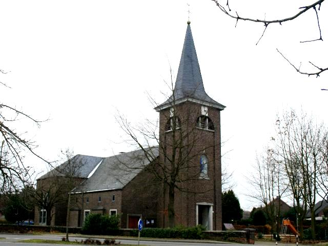 Kirche Rickelrath